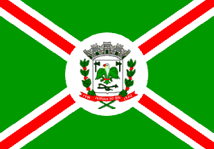 Bandeira do Município de Jandaia do Sul, Estado Paraná, Brasil